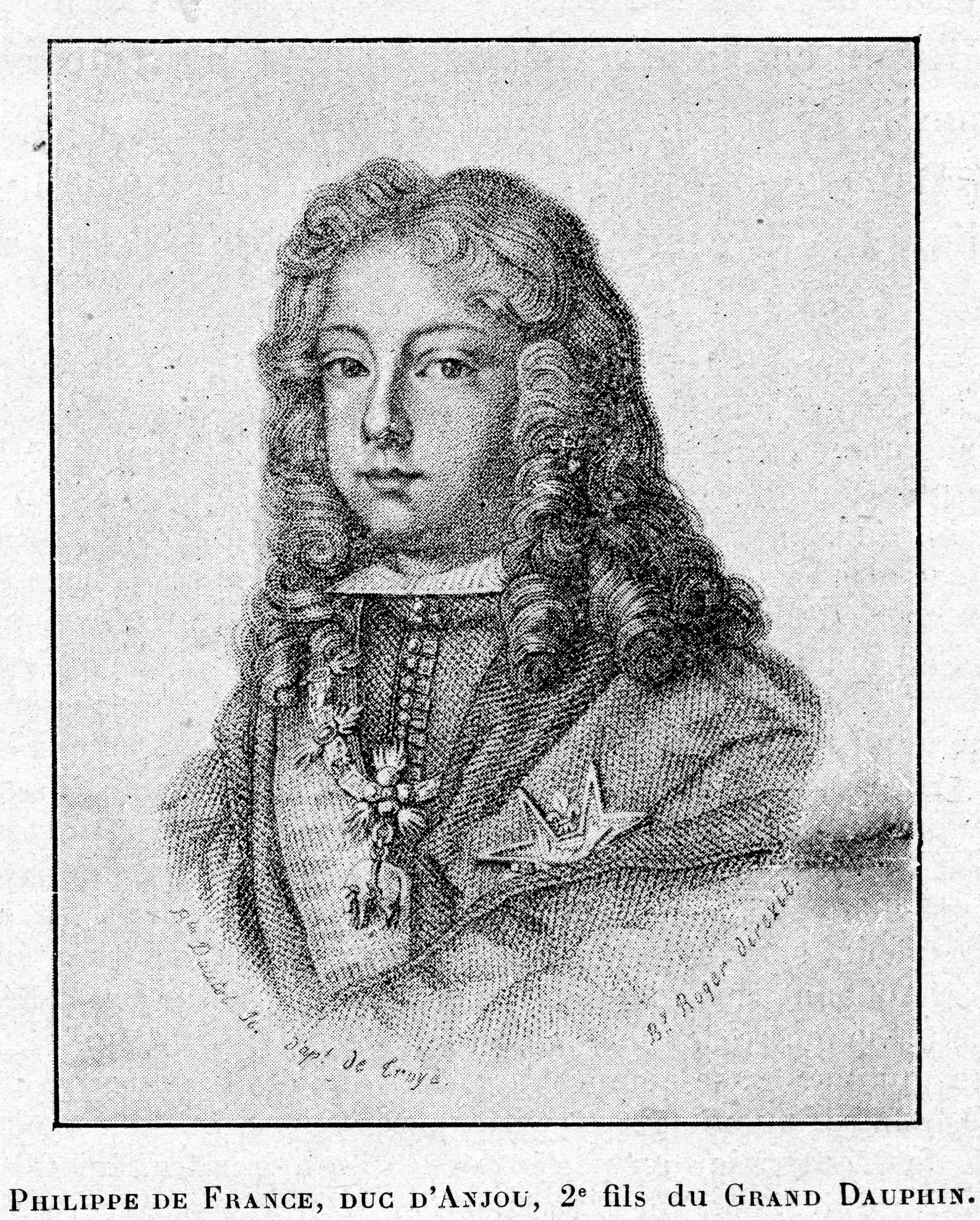 Cabanès, Éducation de Princes028 Philippe de France, duc d´Anjou, 2e fils du Grand Dauphin